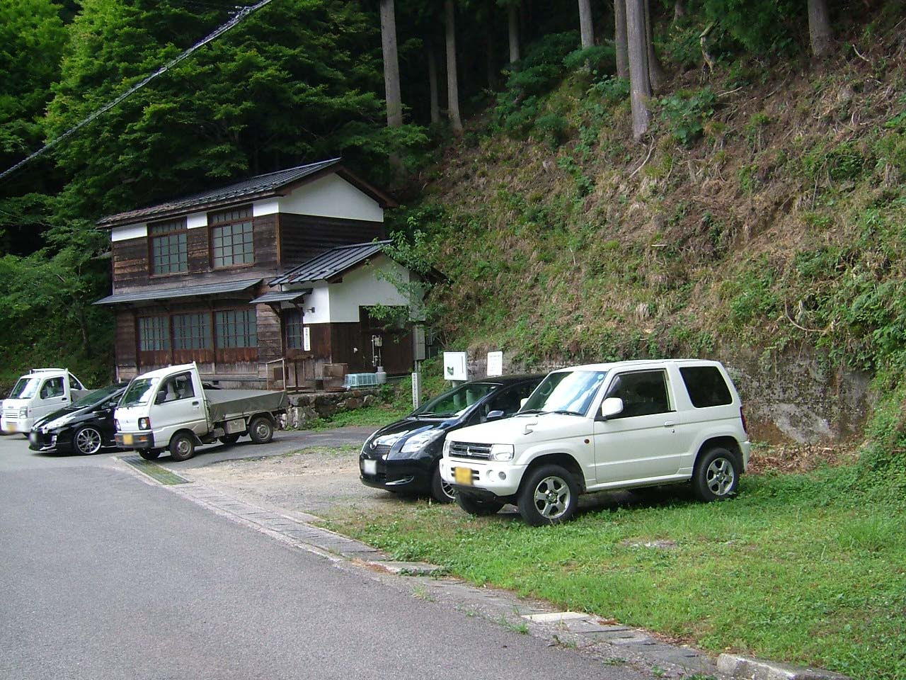 智頭町立智頭小学校旧板井原分校